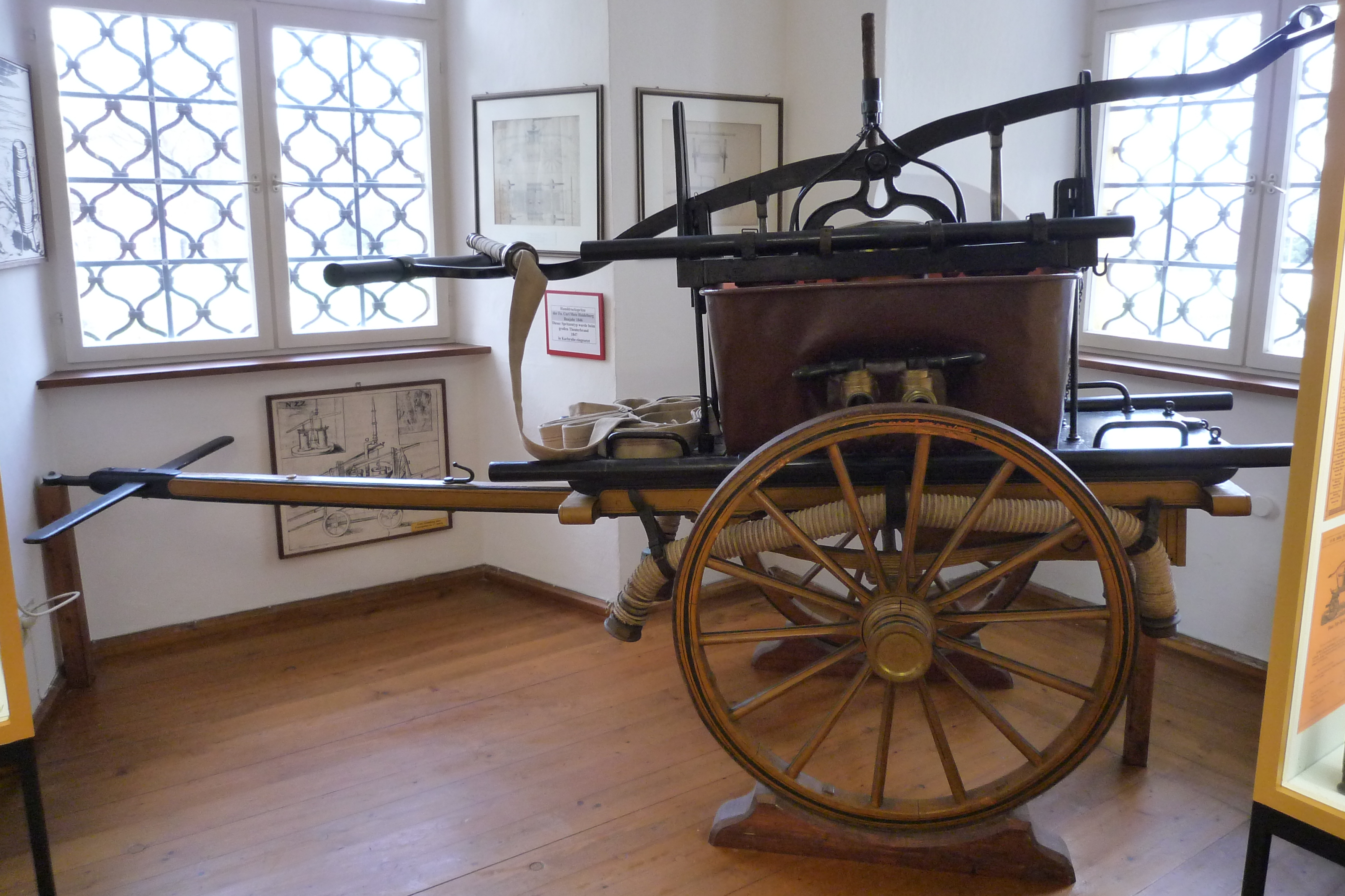 Handdruckspritze von Carl Metz Heidelberg aus dem Jahr 1846 im Feuerwehrmuseum in Salem am Bodensee